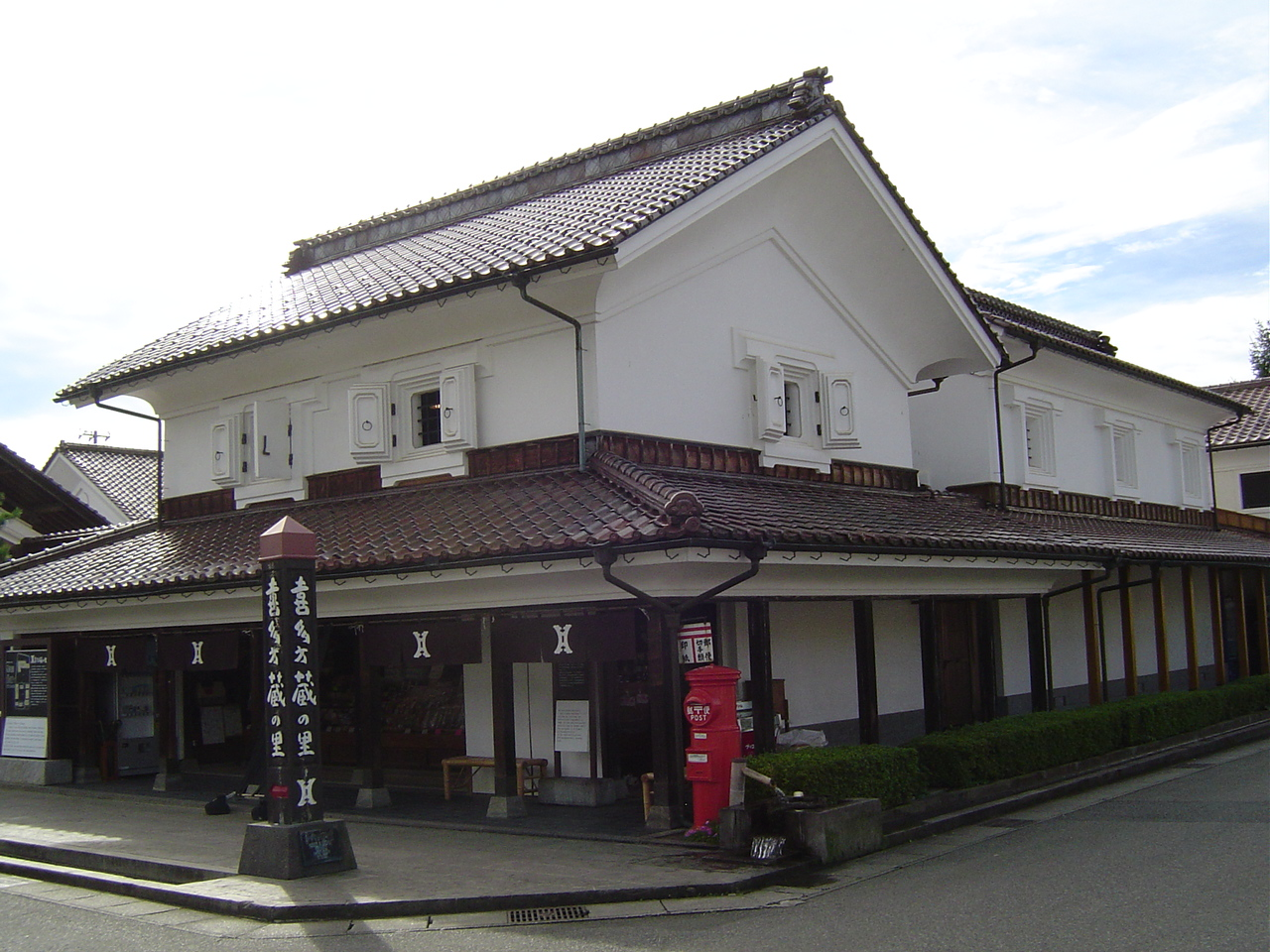 福島県喜多方市押切喜多方蔵の里